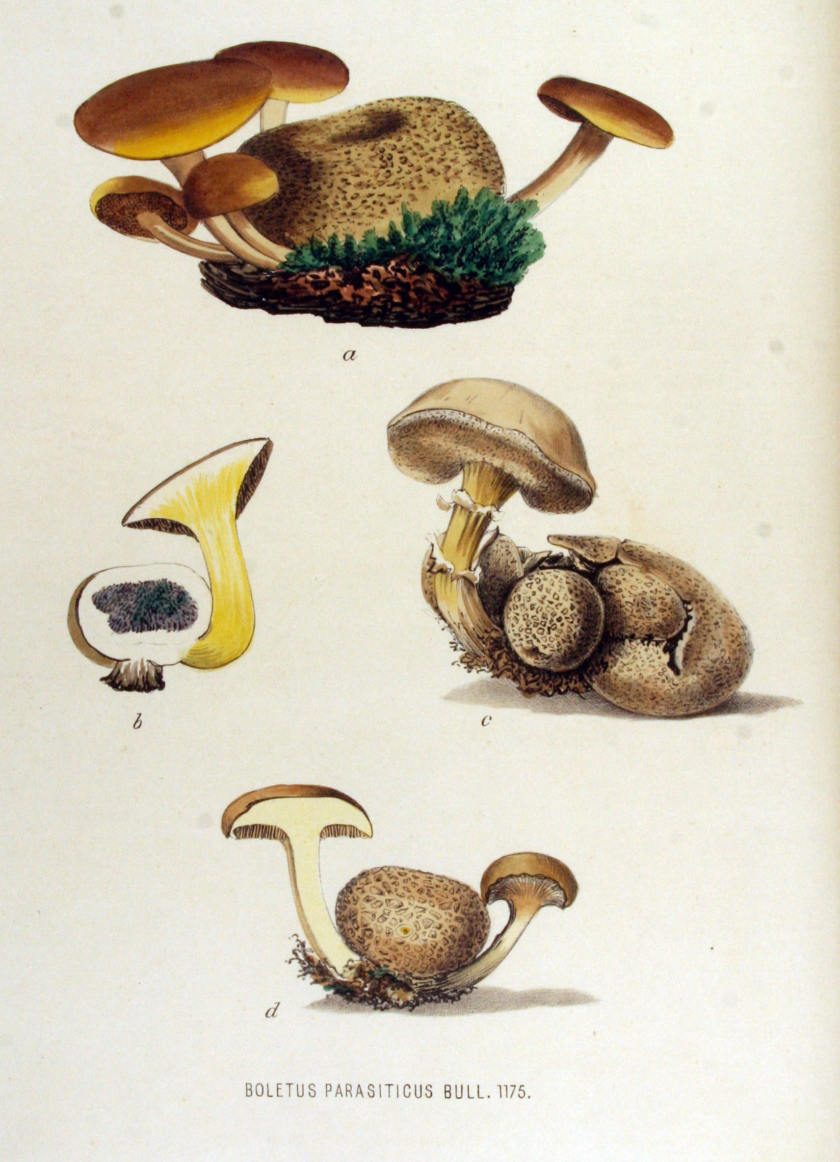 Boletus parasiticus